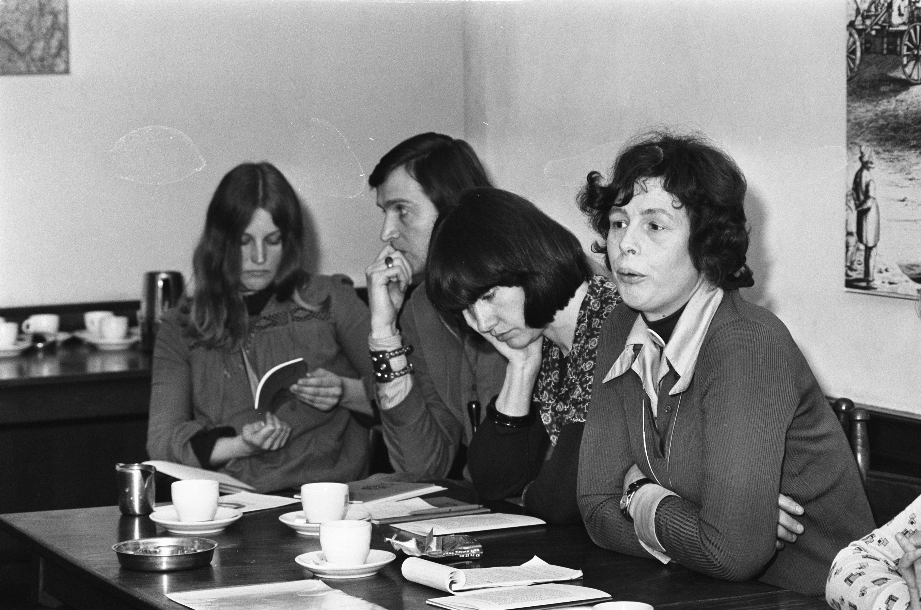 Collectie / Archief : Fotocollectie Anefo Reportage / Serie : [ onbekend ] Beschrijving : Rooie vrouwen prestenteren boekje in Den Haag ; v.l.n.r. (onbekend), (onbekend), mevrouw Heynius, mevrouw Van de Merwe (voorzitter Rooie Vrouwen) Datum : 19 maart 1975 Locatie : Den Haag, Zuid-Holland Trefwoorden : boeken, emancipatie, feminisme, politiek, presentaties, vrouwenbeweging Persoonsnaam : Heynius, Merwe van de Fotograaf : Mieremet, Rob / Anefo Auteursrechthebbende : Nationaal Archief Materiaalsoort : Negatief (zwart/wit) Nummer archiefinventaris : bekijk toegang 2.24.01.05 Bestanddeelnummer : 927-8130